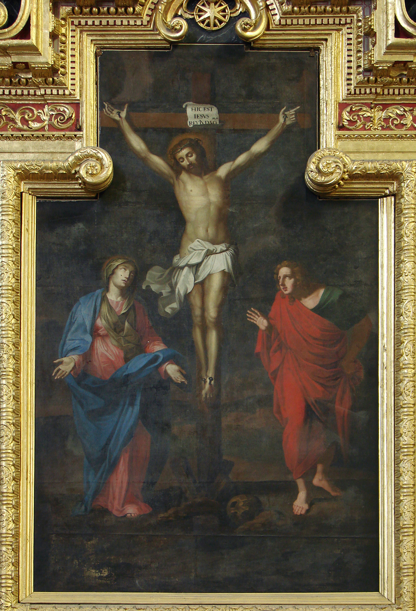 provenant du couvent des Fontevristes de Moreaucourt